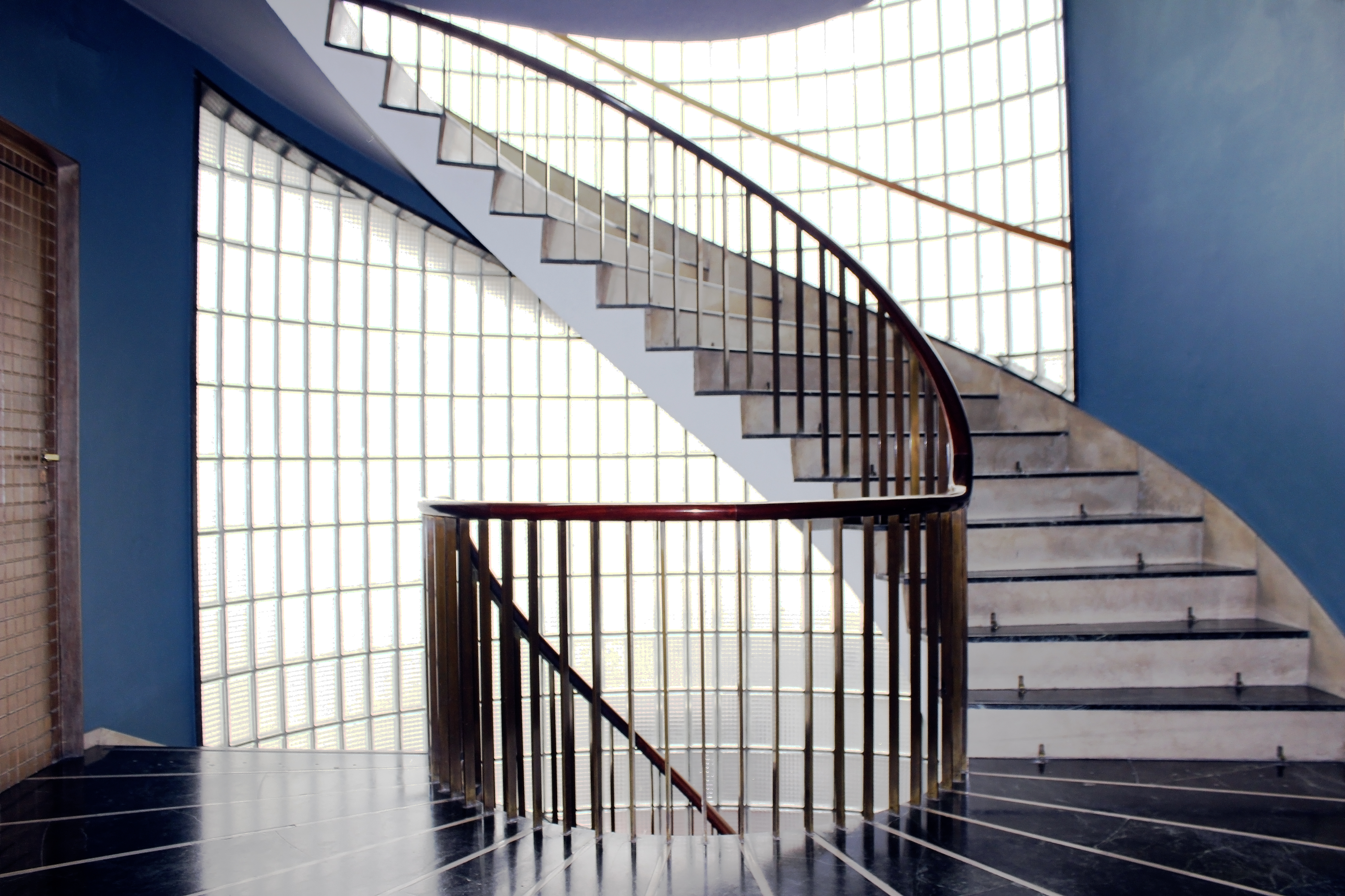 Hueco de escalera de la 1ª Planta